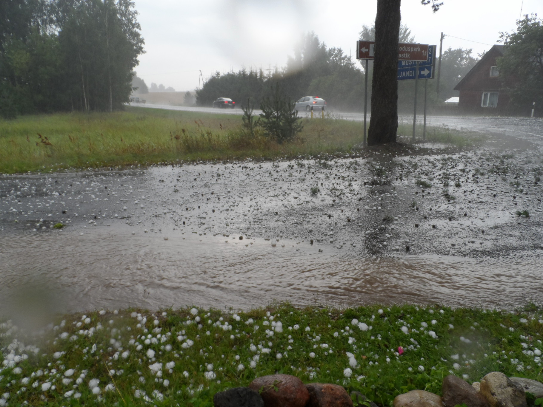 Hiidrahe sadu Jõgevamaal